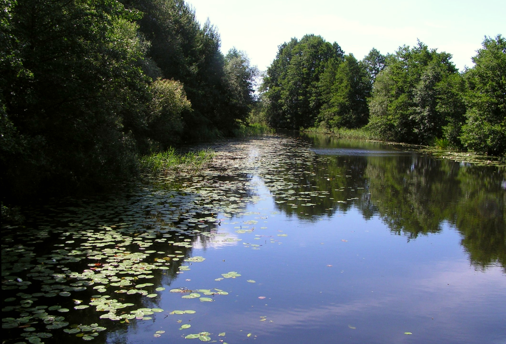 Der „Vosswinkler Kammerkanal“ bei Neustrelitz in der Mecklenburgischen Seenplatte. Er verbindet den Zierker See mit dem Woblitzsee.